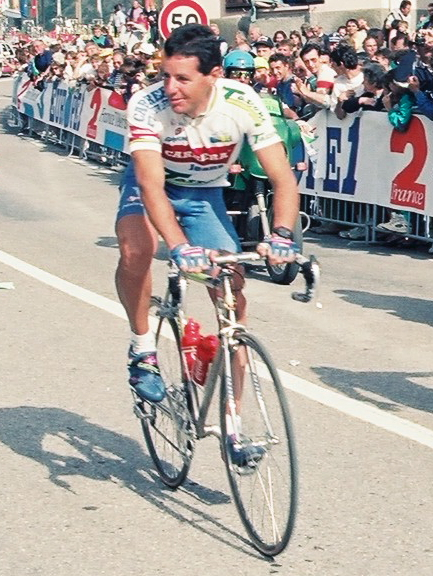 Stephen Roche (Carrera) et Charly Mottet (Novemail-Histor) lors de la douzième étape du Tour de France 1993.